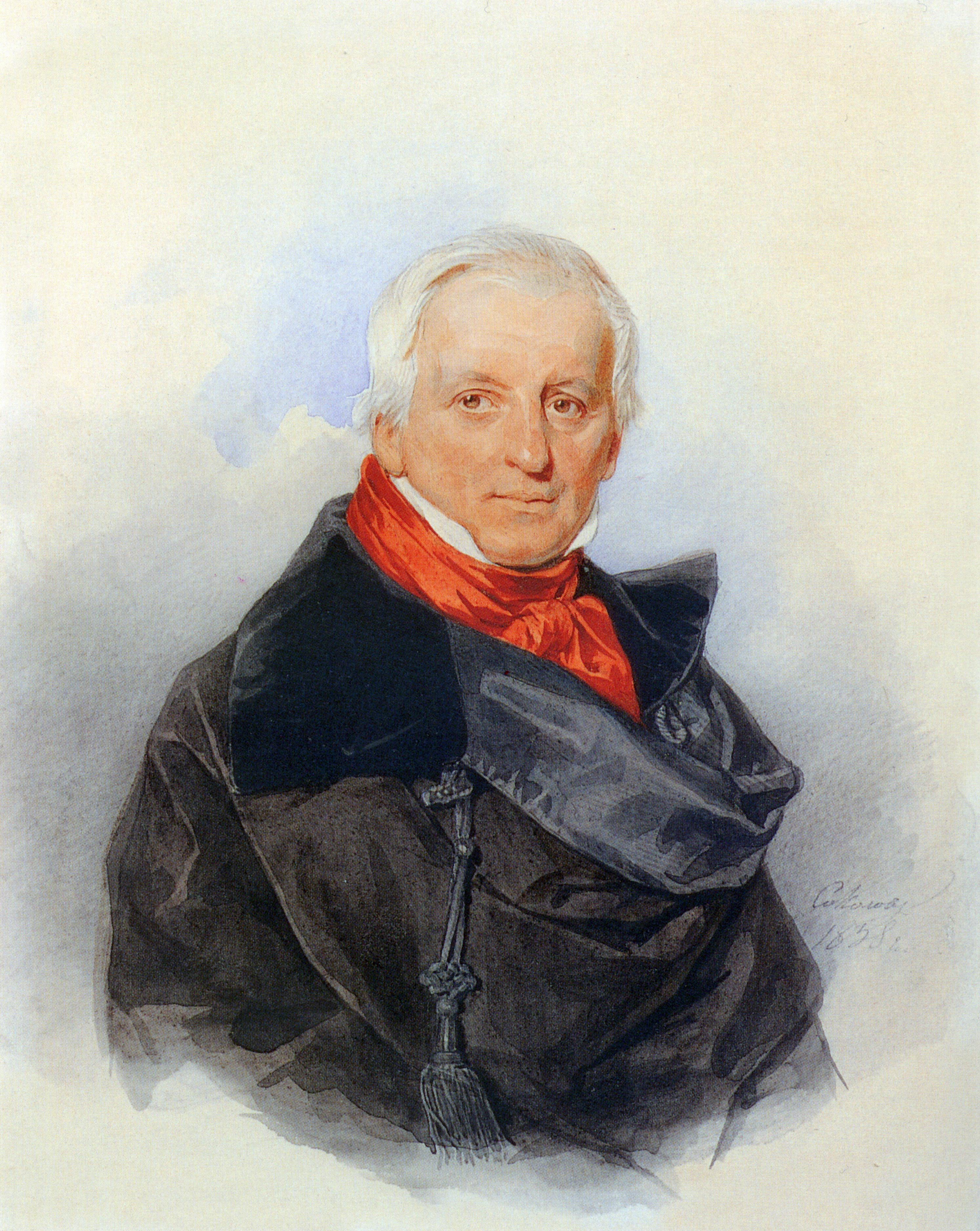 Кампиони Сантин Петрович (1774-1847), скульптор.